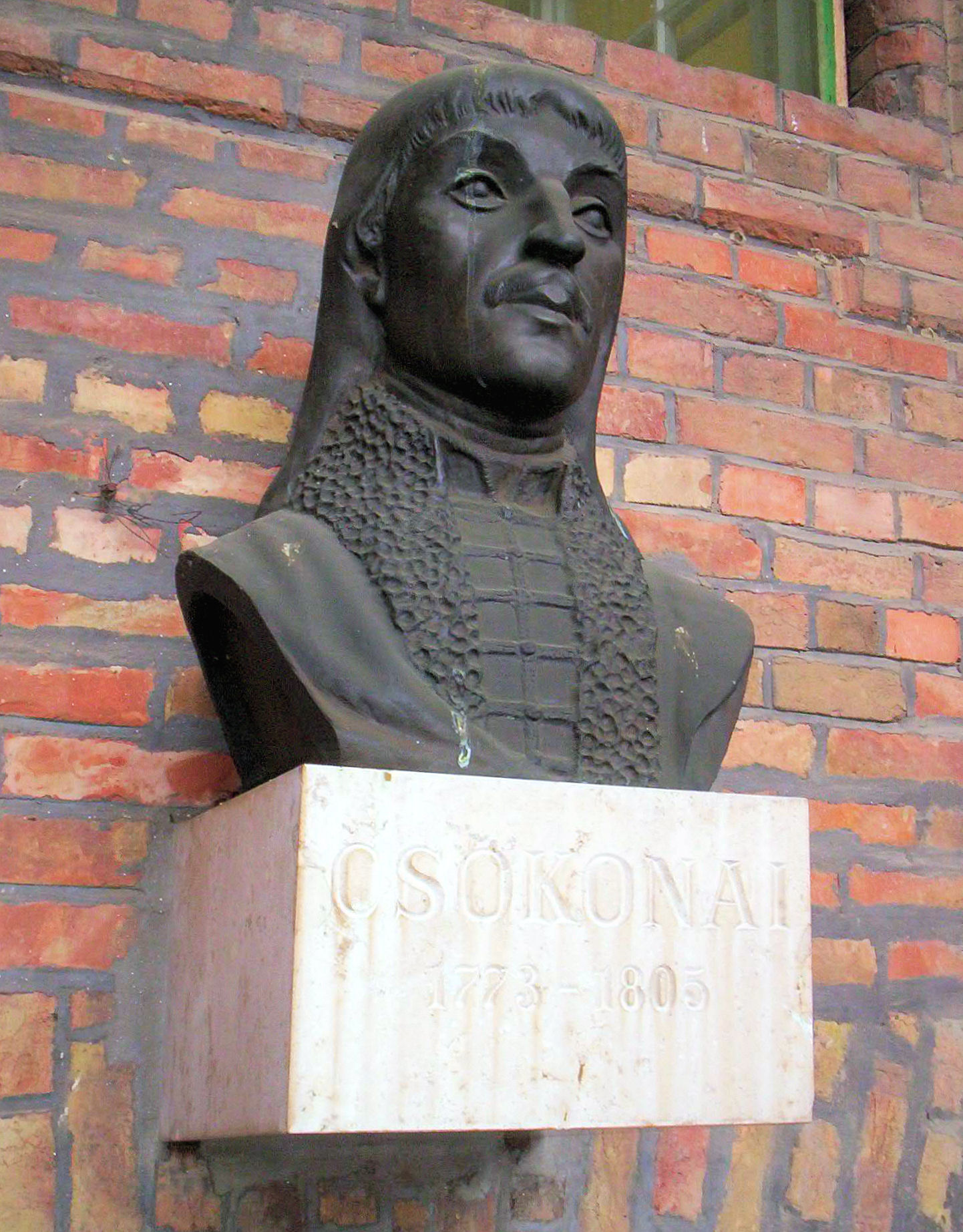 Csokonai Vitéz Mihály szobra Szegeden. A szobor Szandai Sándor [1] alkotása